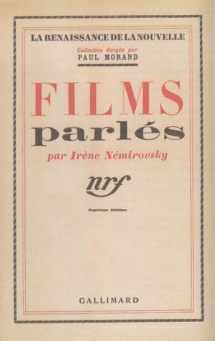 Page de couverture d'un volume de la Collection « La Renaissance de la Nouvelle » de la NRF, où quatre nouvelles d'Irène Némirovsky ont été publiées en 1935.